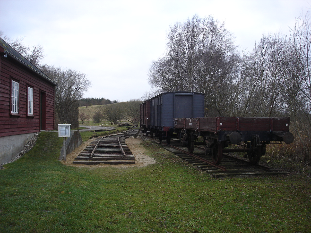 Sundsøre Pakhus, sporsiden fra Ø